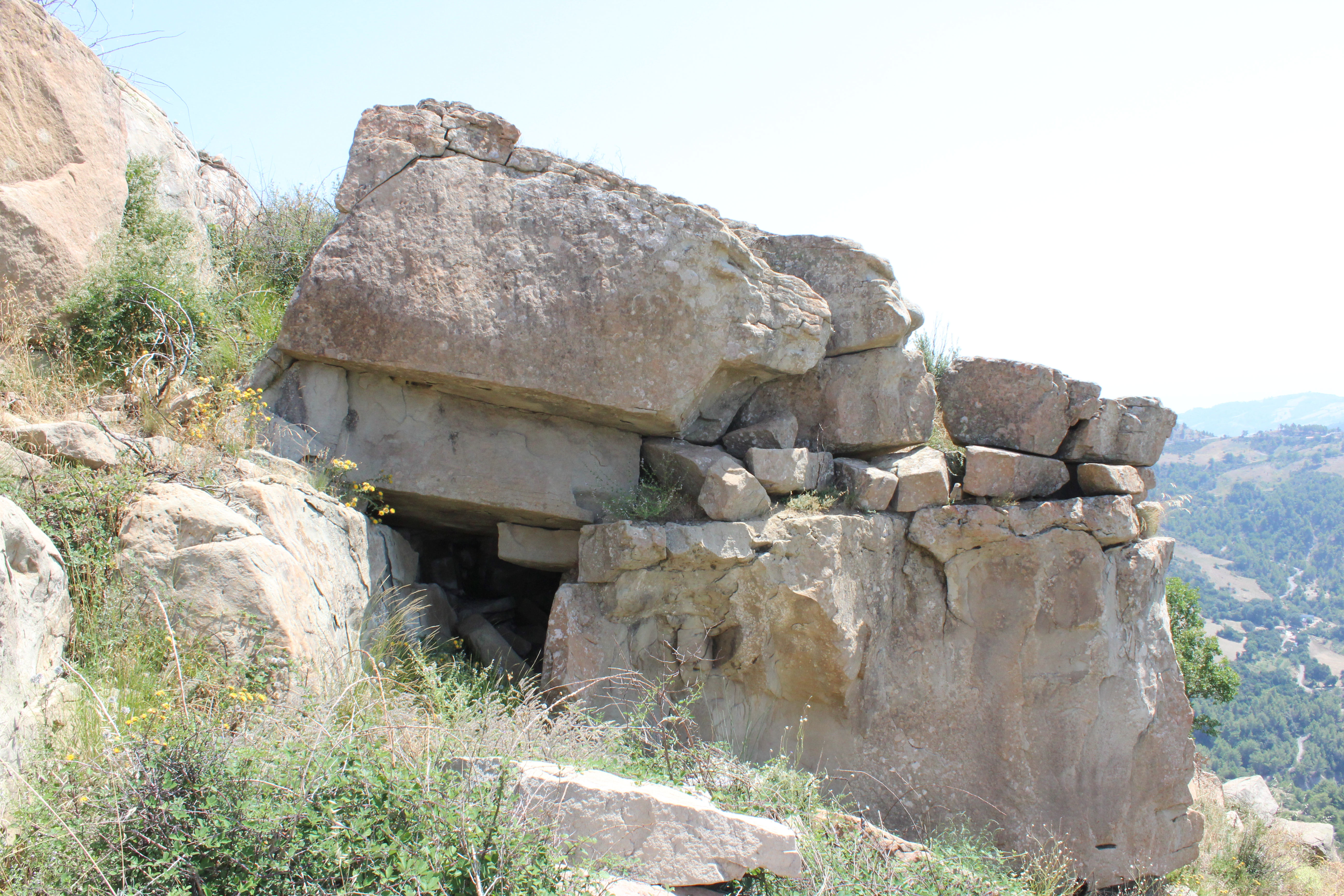 Grotta della timpa di Santa Ranura o di Timpone del Pico